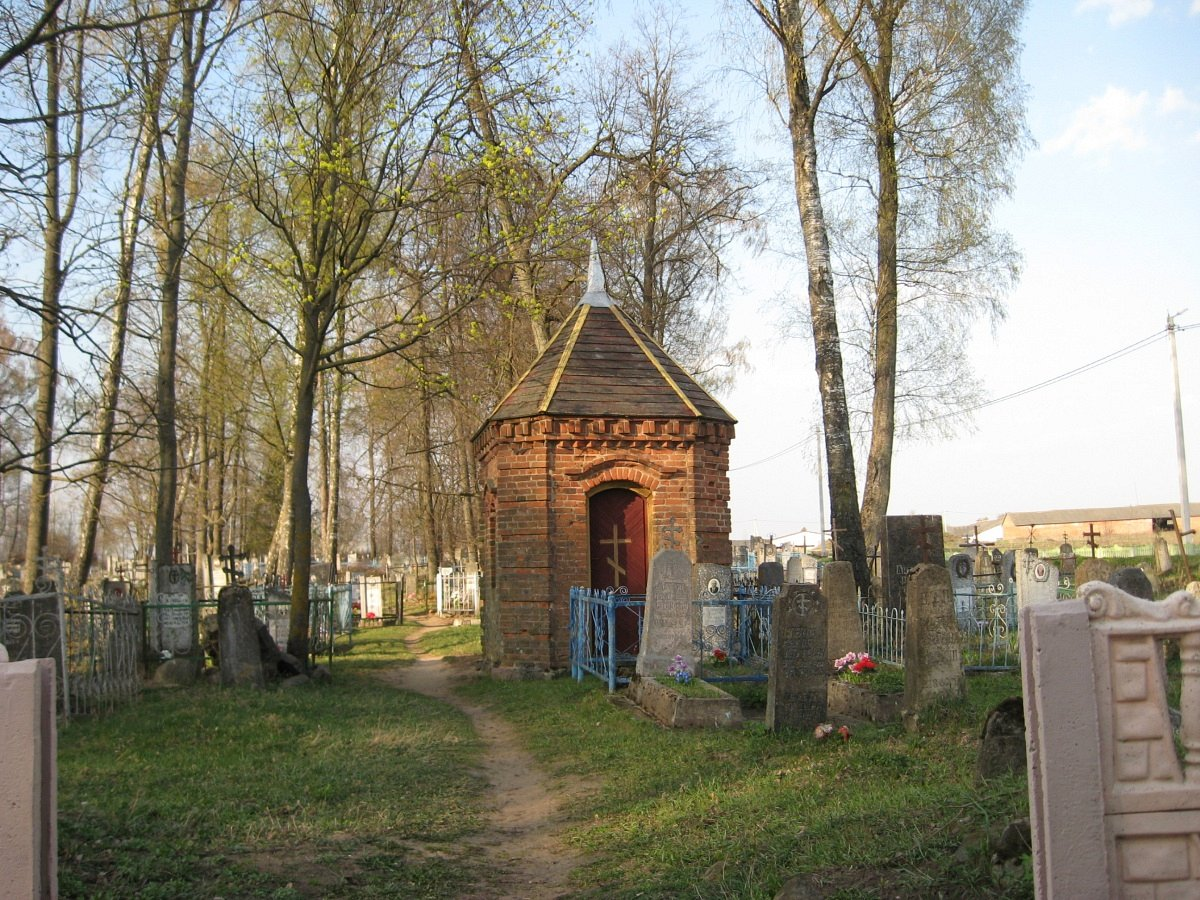 Княгінін. Капліца